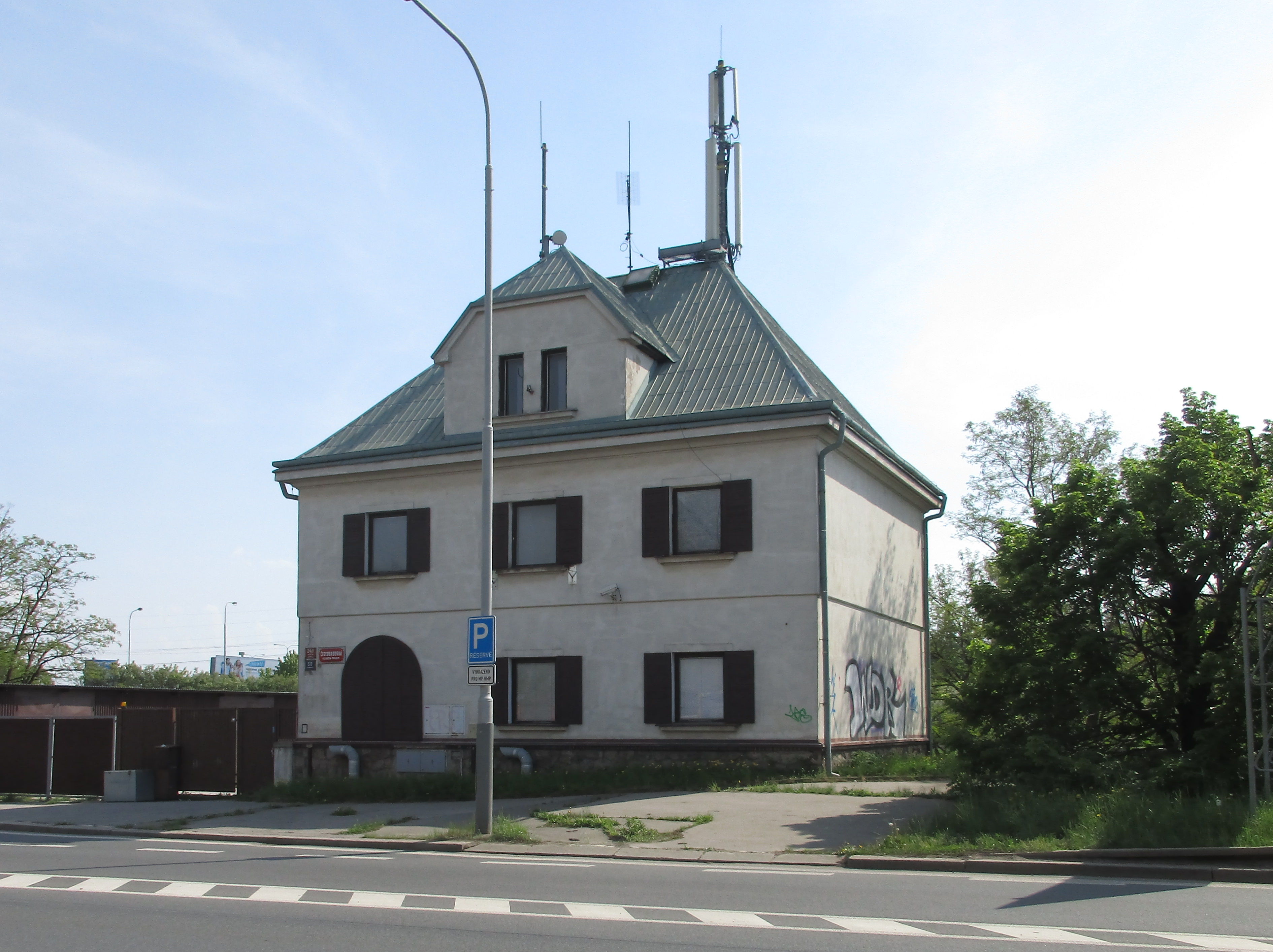 Praha 9-Kyje, Českobrodská 248/50. Budova bývalého akcízu.